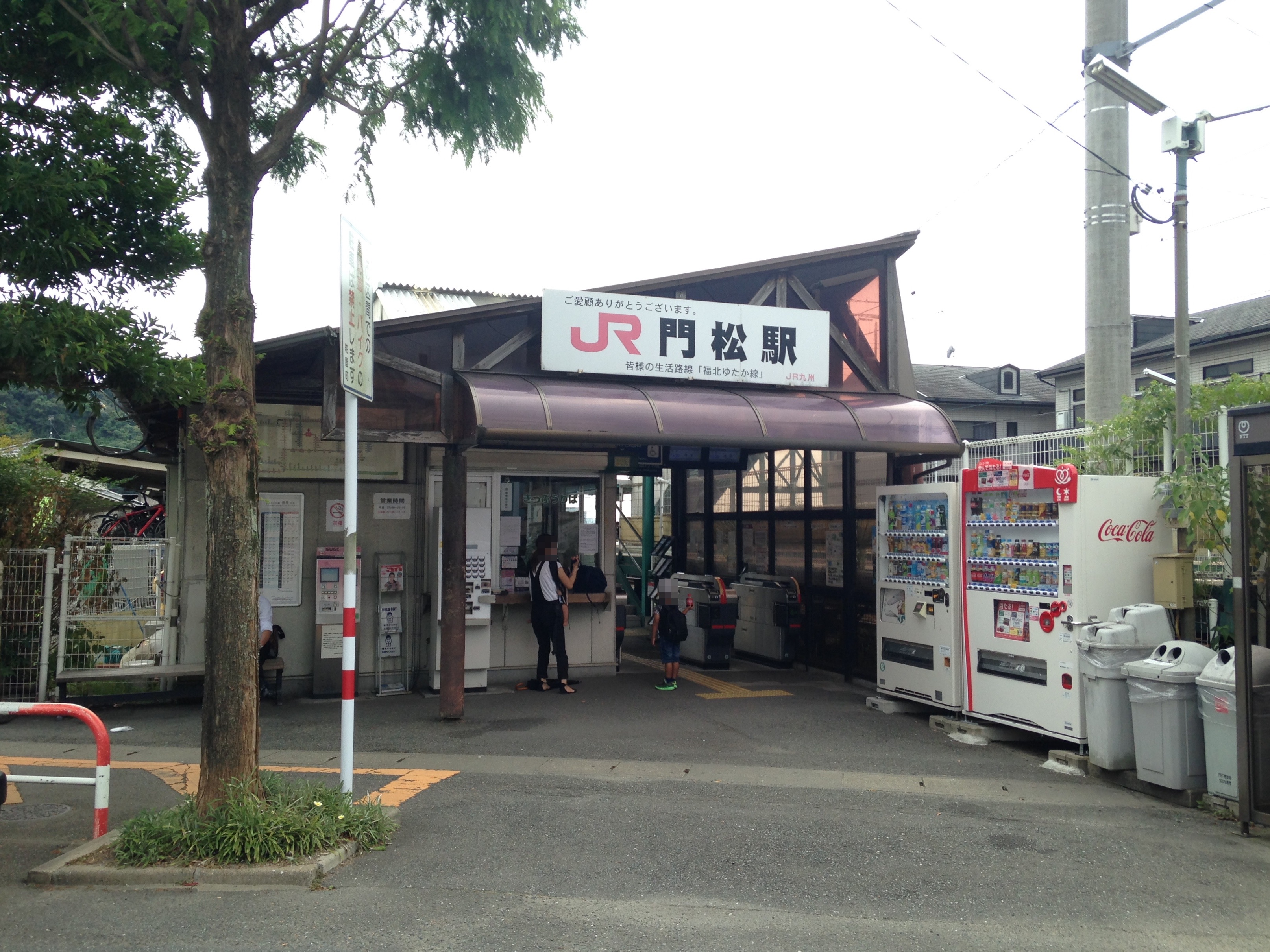 門松駅駅舎